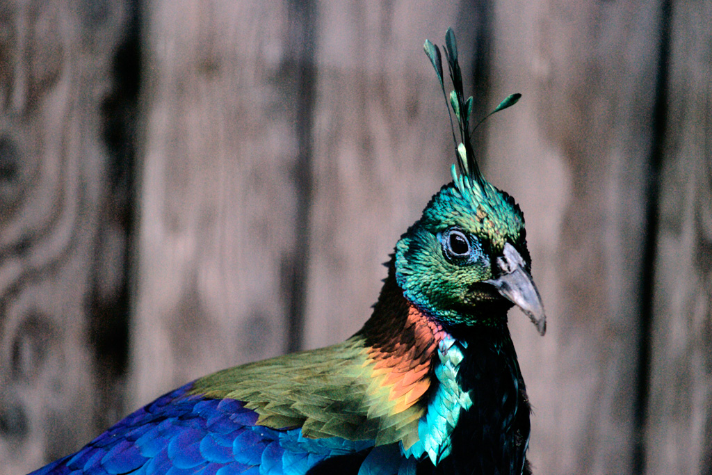 Himalayan Monal Sony %u03B1900, AF100-300mmF4.5-5.6 APO Zoorasia, Yokohama, JAPAN